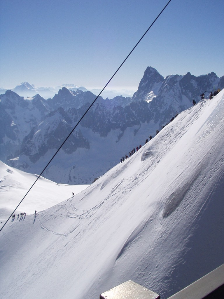 Abstieg zum Vallée Blanche, Chamonix